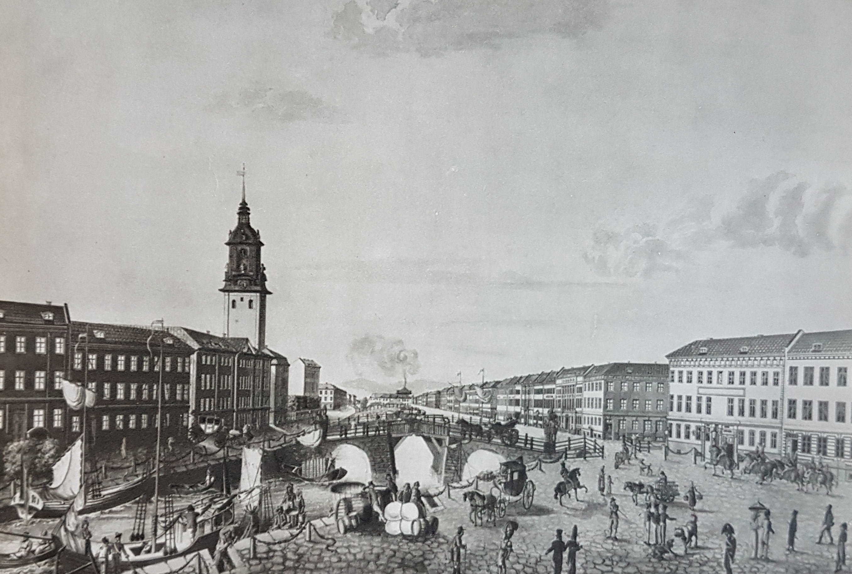 Vue af Götheborg skapad av Johan Fredrik Löwegren, avfotograferad bild från Allhems Svenskt konstnärslexikon.